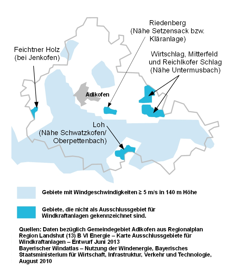 Windkraft - Nicht-Ausschlussgebiete auf dem Gemeindegebiet Adlkofen